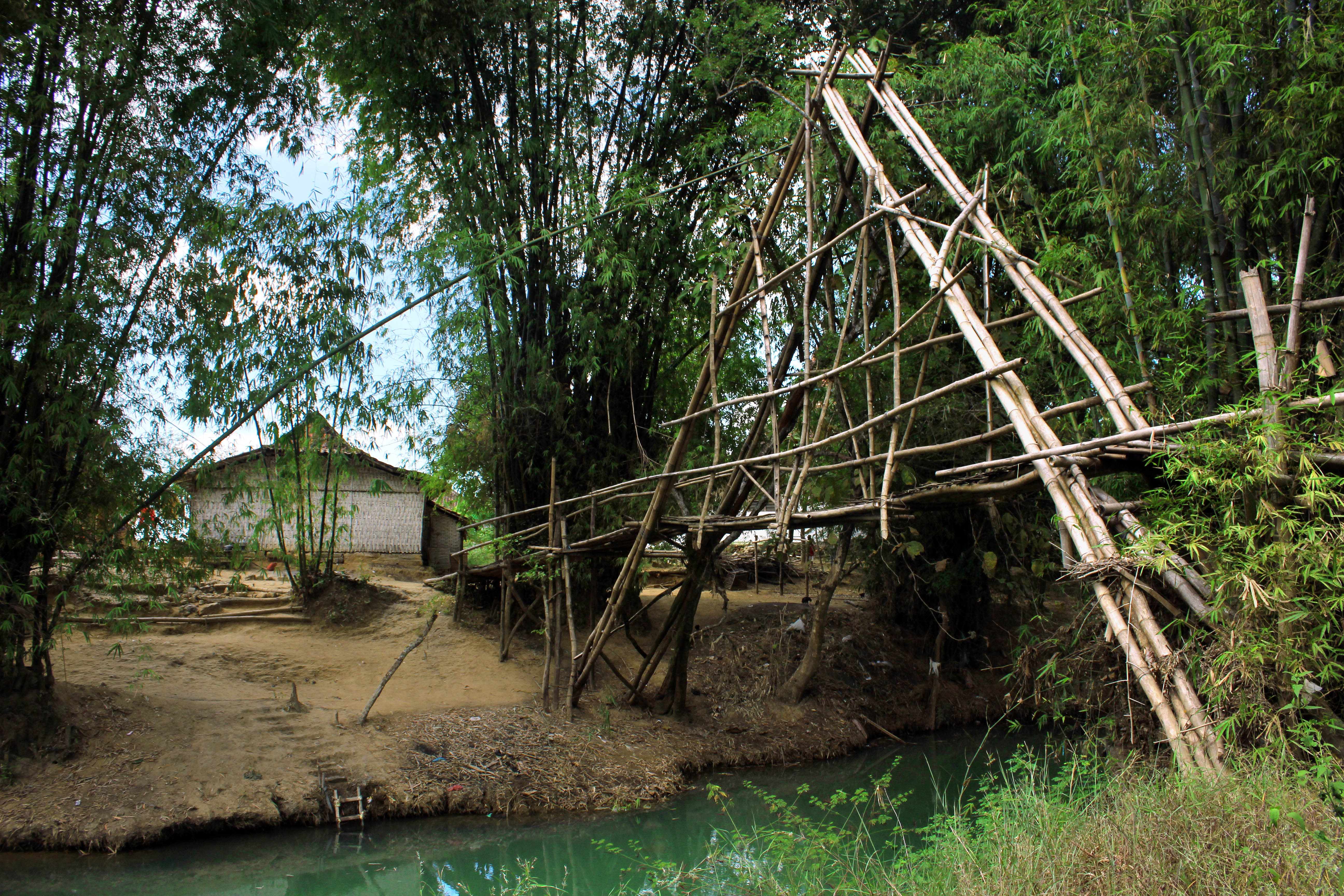 Kodik